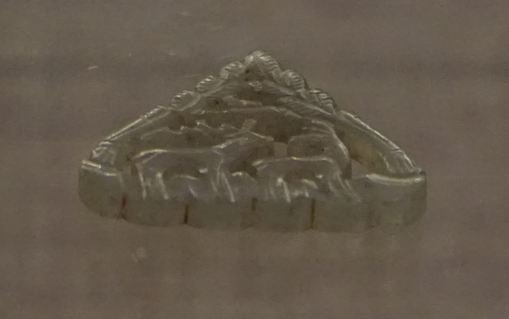 中文（中国大陆）: 双鹿纹玉佩 金 绥滨县奥里米金墓出土。和田白玉雕成，左侧公鹿引颈而鸣，右侧母鹿回望。两鹿上方有一大雁